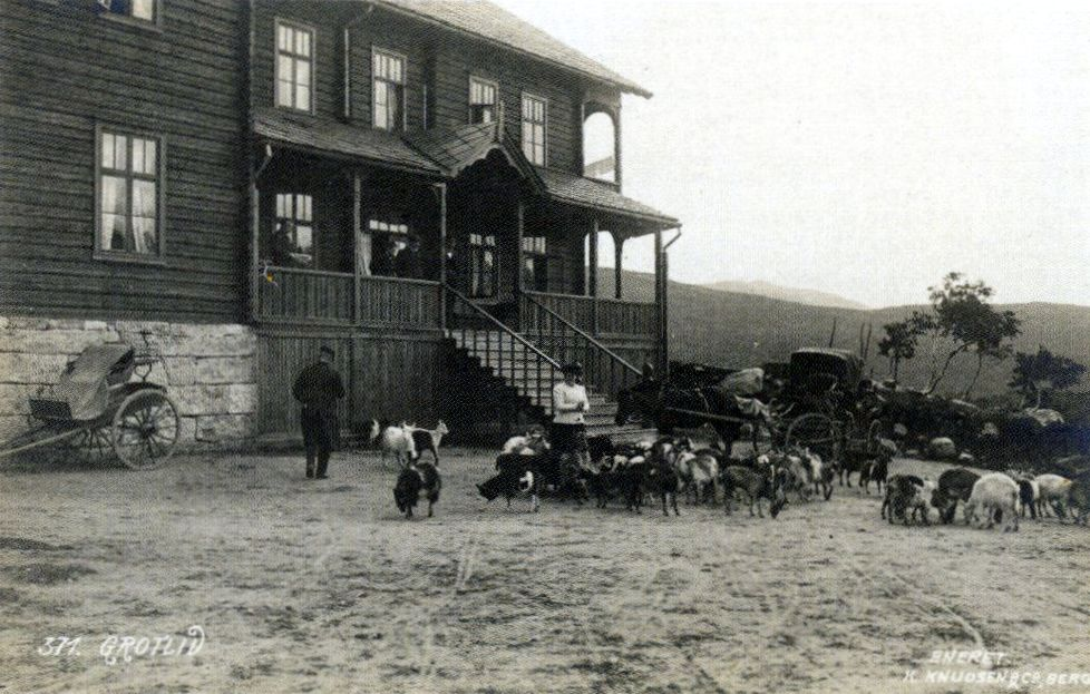 Fjellstua på Grotli på slutten av 1800-tallet.